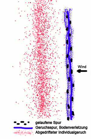 Spur